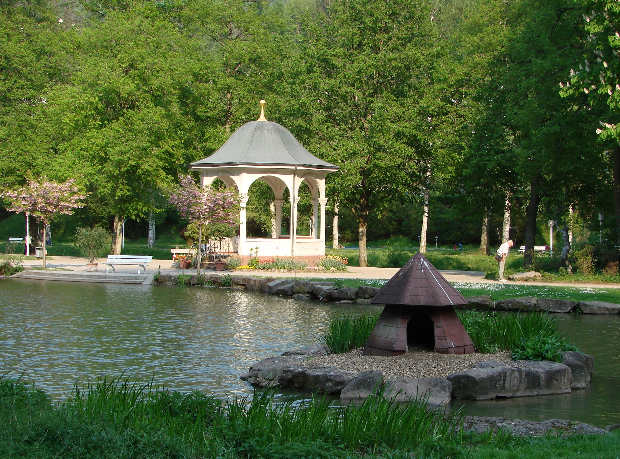 Bad Liebenzell, Kurpark (spa gardens)